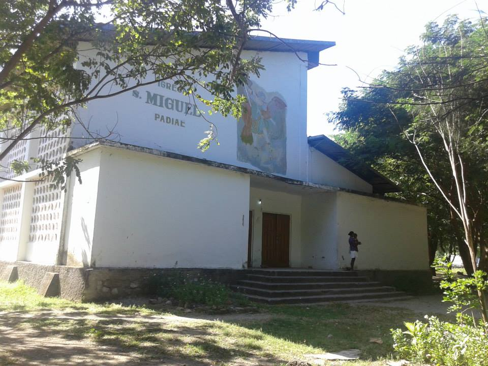 Igreja Sao Miguel, Padiae, Lalisuc